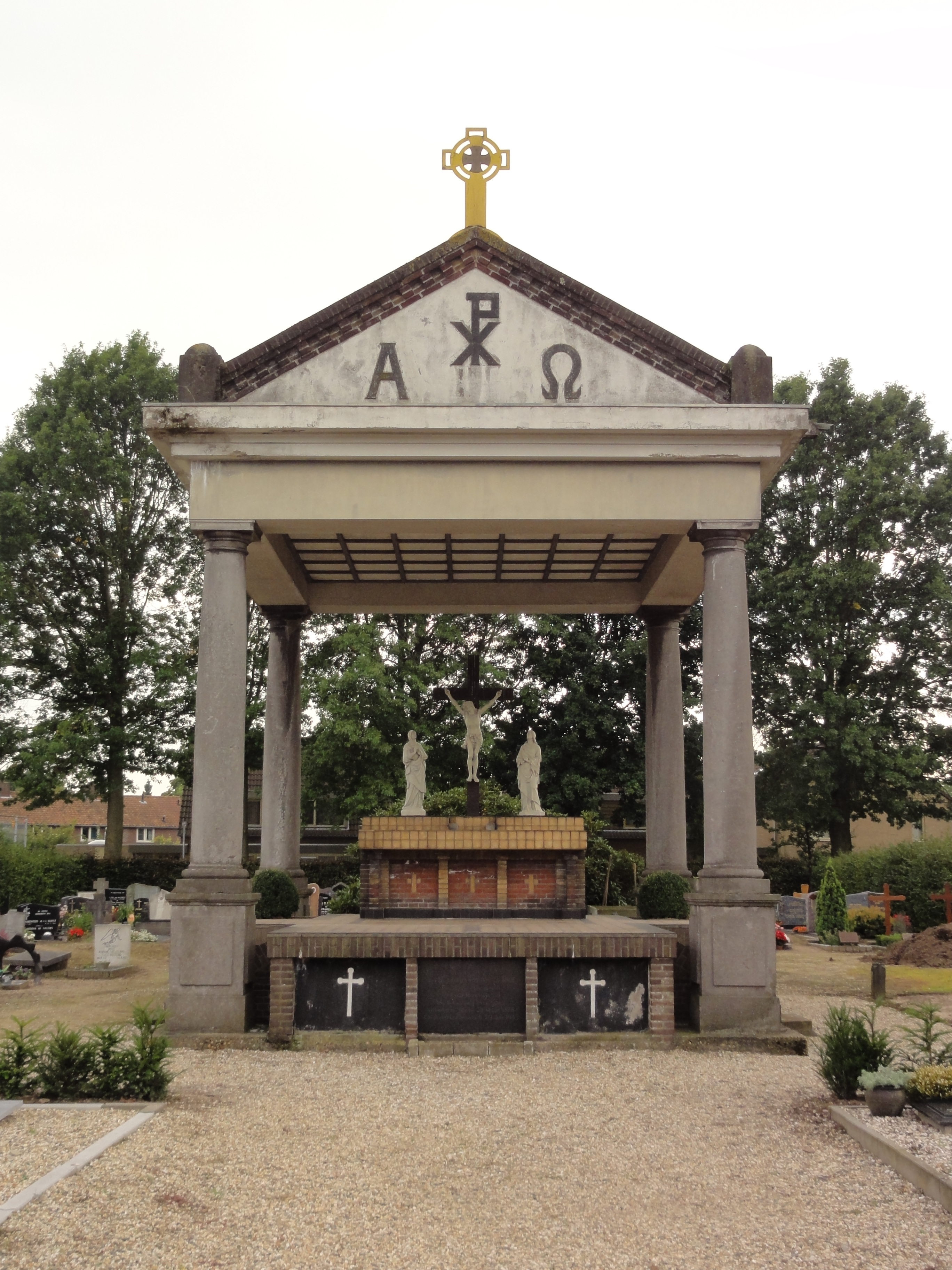 (Overasselt (Heumen) Rijksmonument 523922 kerkhofkapel